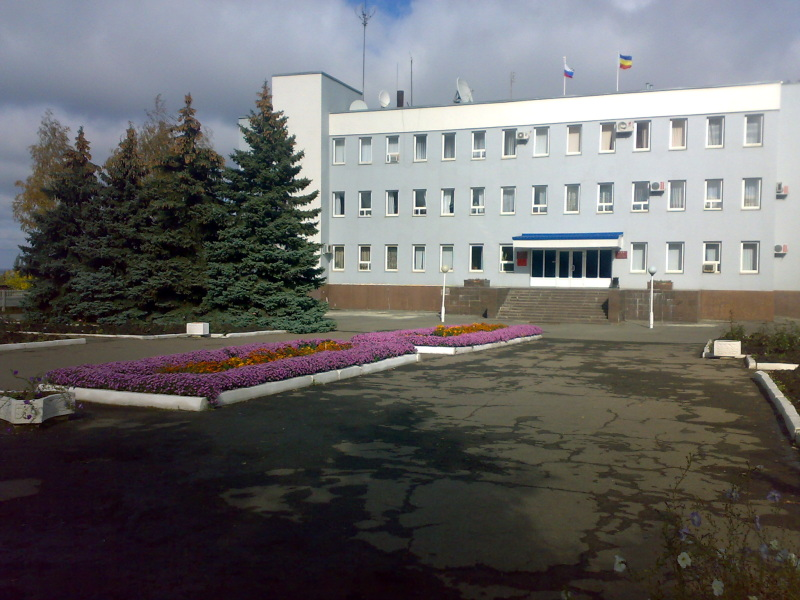 Здание администрации Чертковского района Ростовской области